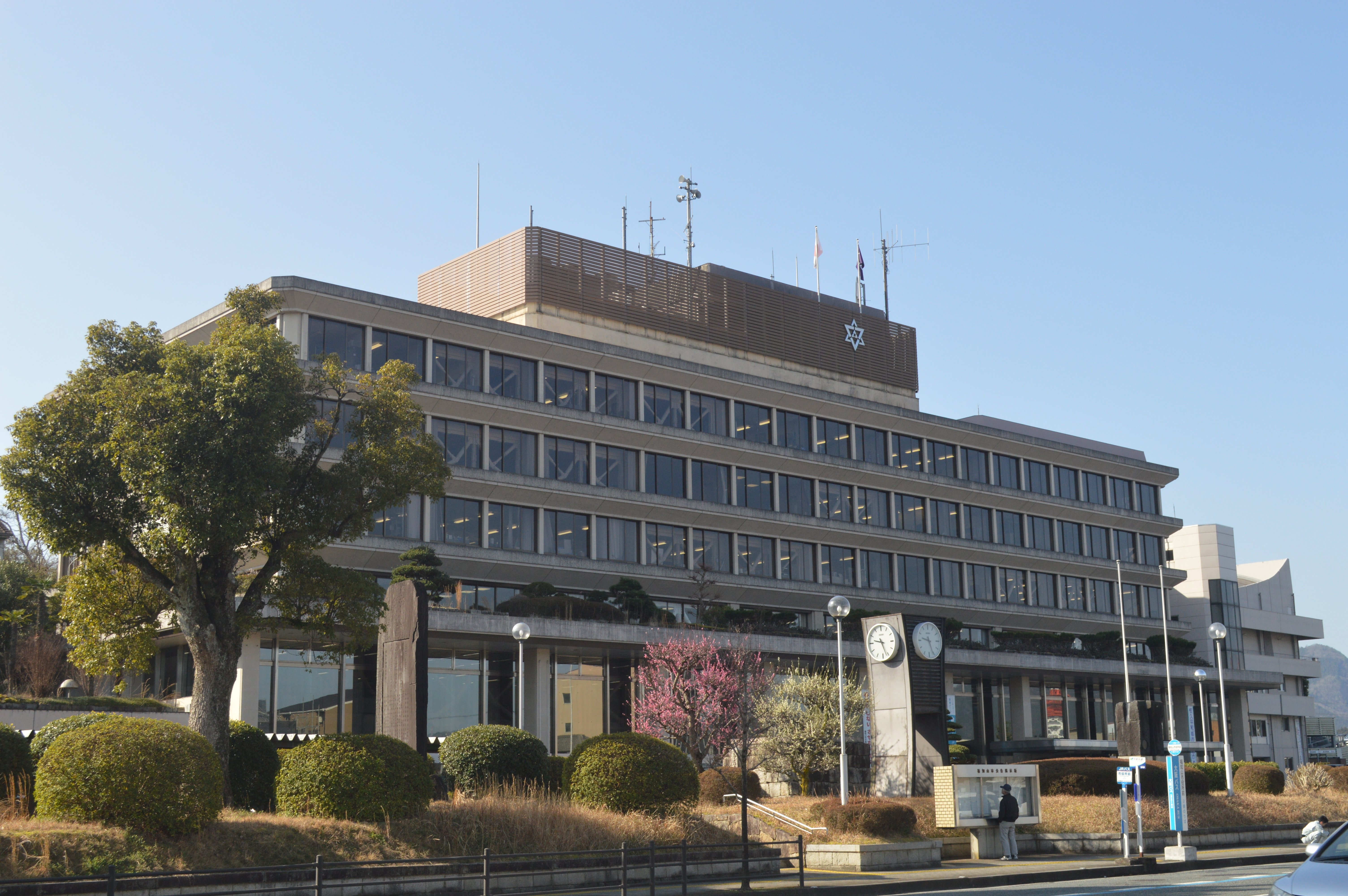 京都府福知山市字内記13番地1にある福知山市役所。